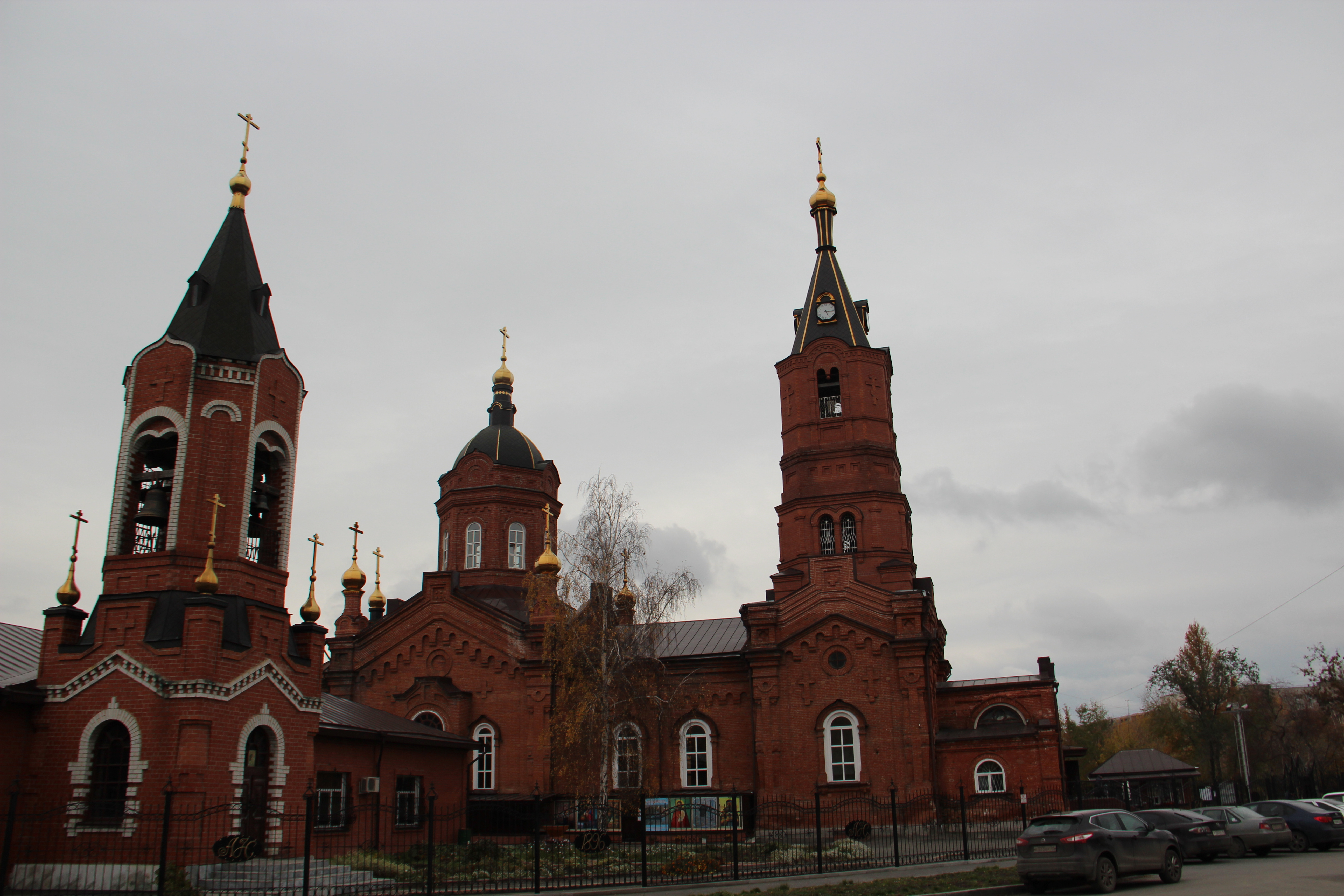 Памятник культового зодчества - Александро-Невская церковь (Курганская область, Курган, улица Володарского, 42)